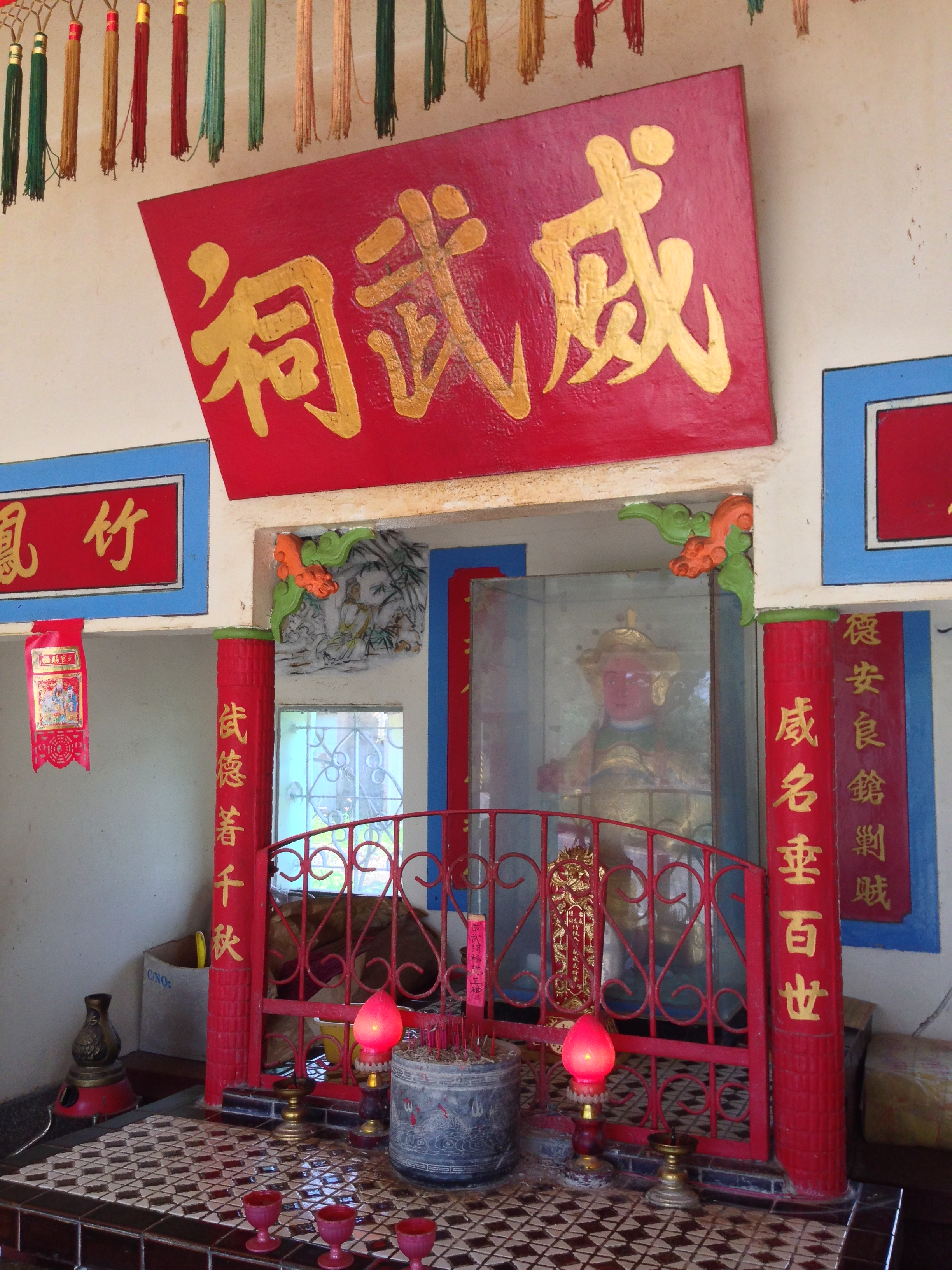 竹扶人威武將軍祠內